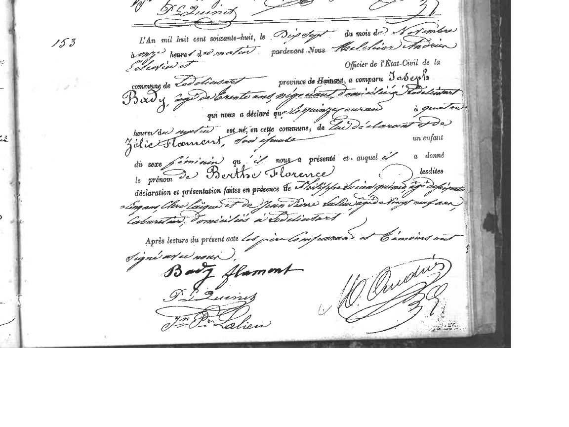 Birth certificate of Berthe Bady